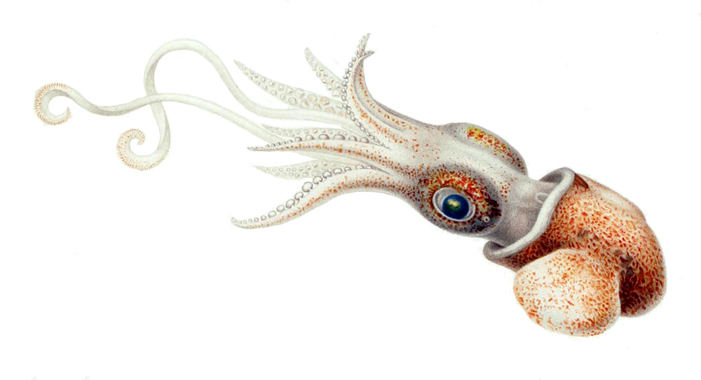 Female Austrorossia mastigophora